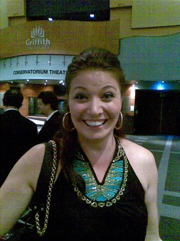 Milijana Nikolic, opera singer (mezzo-soprano)